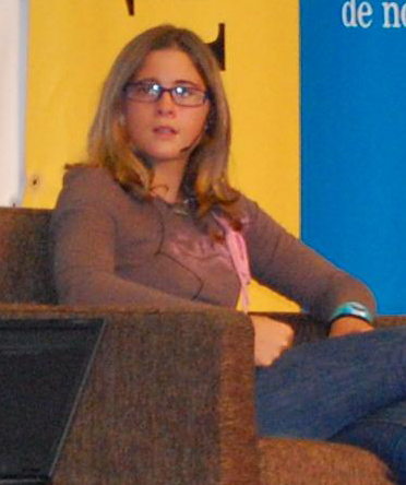 EBE 07. Gisela Pulido